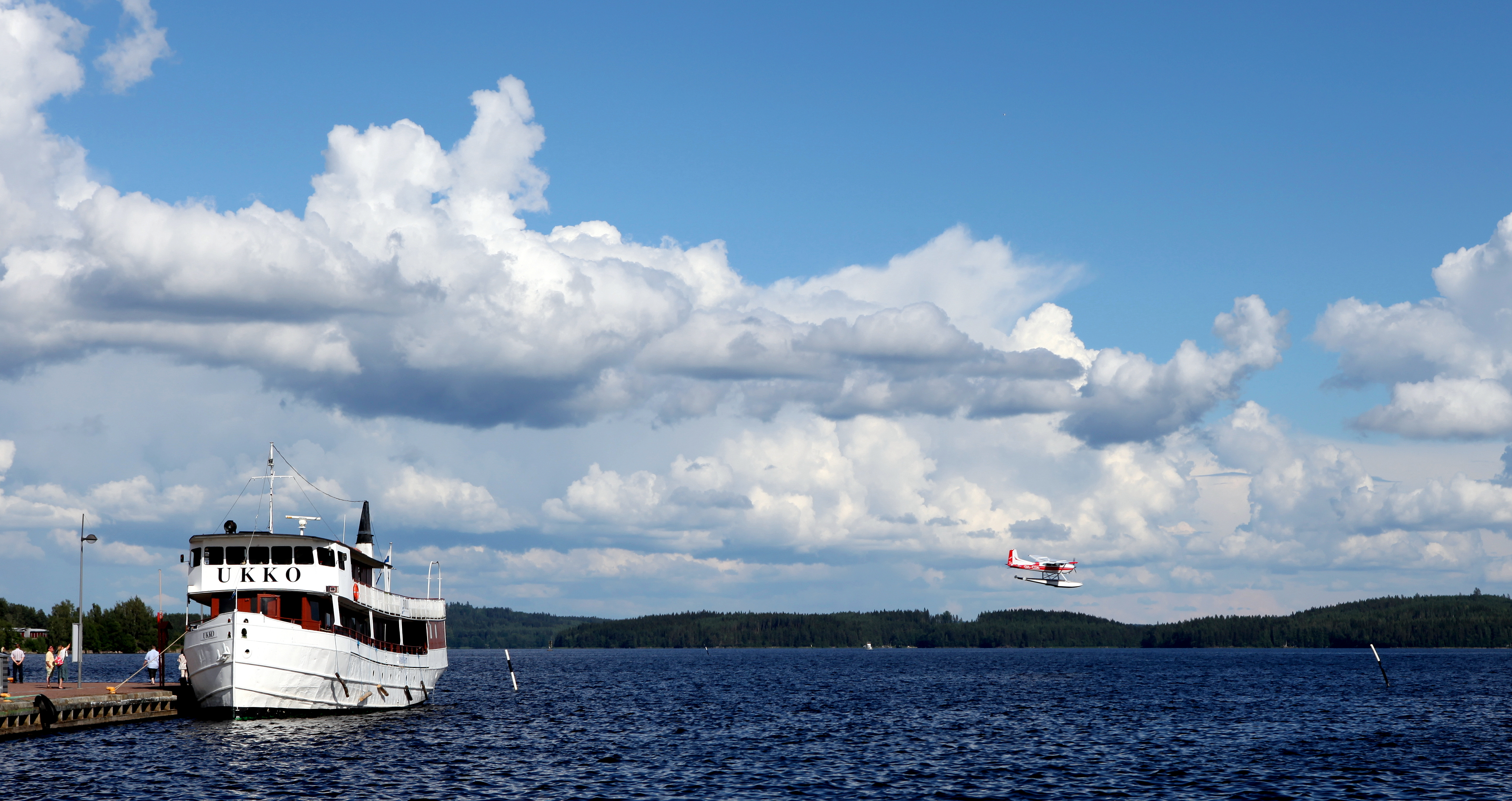 Kuopion satama